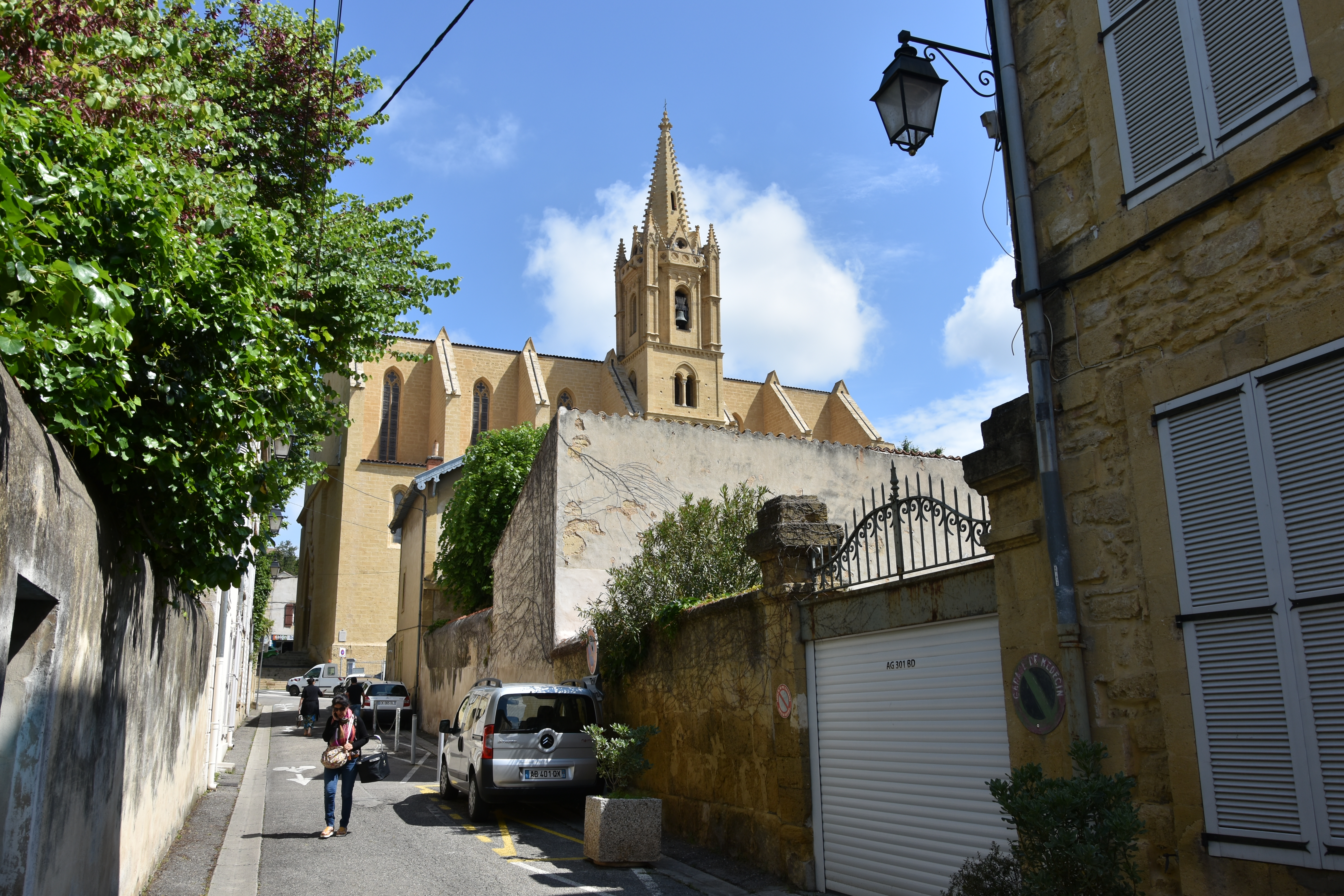 Église Saint-Laurent - Salon-de-Provence 23-05-2018 11-37-37